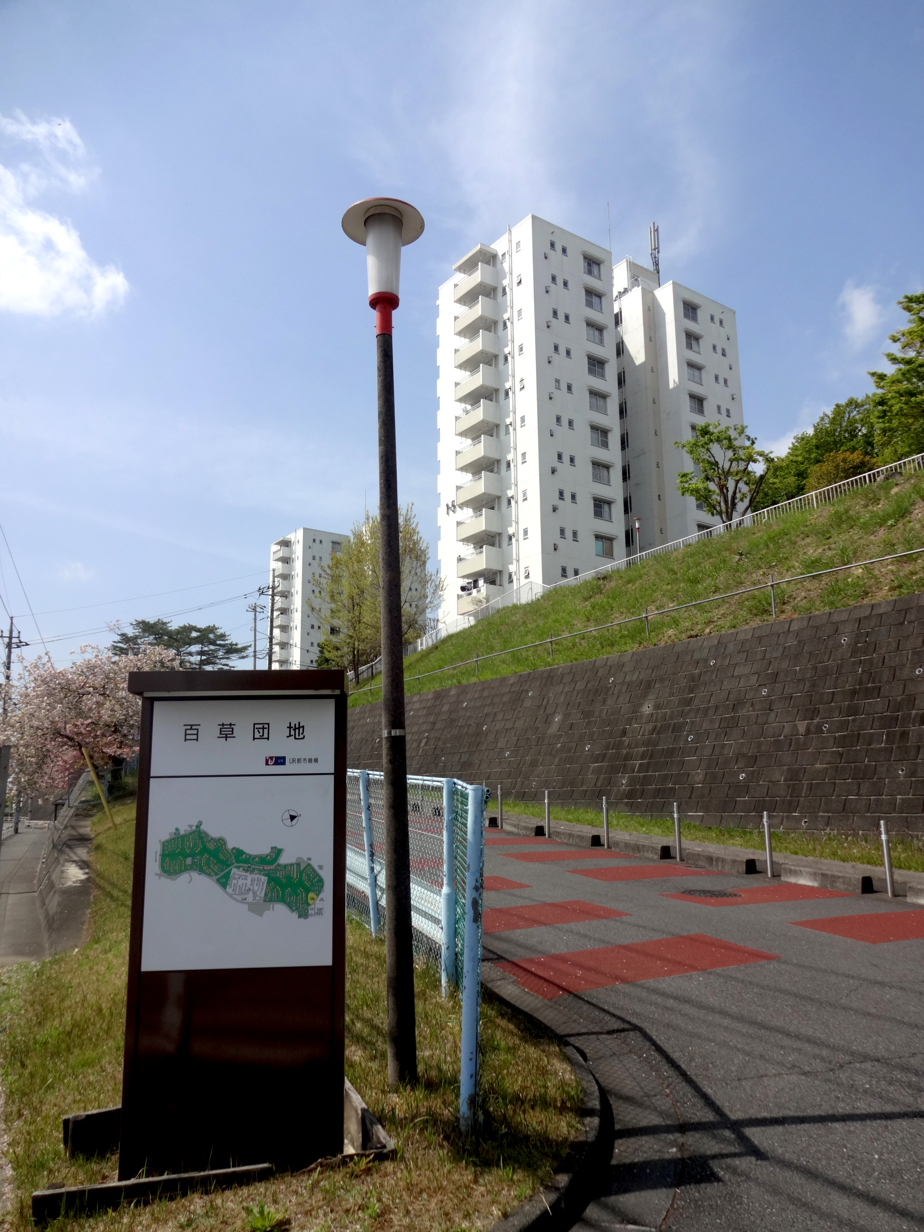 UR都市機構/百草団地1-5-3棟。2019年（平成31年）4月21日撮影。